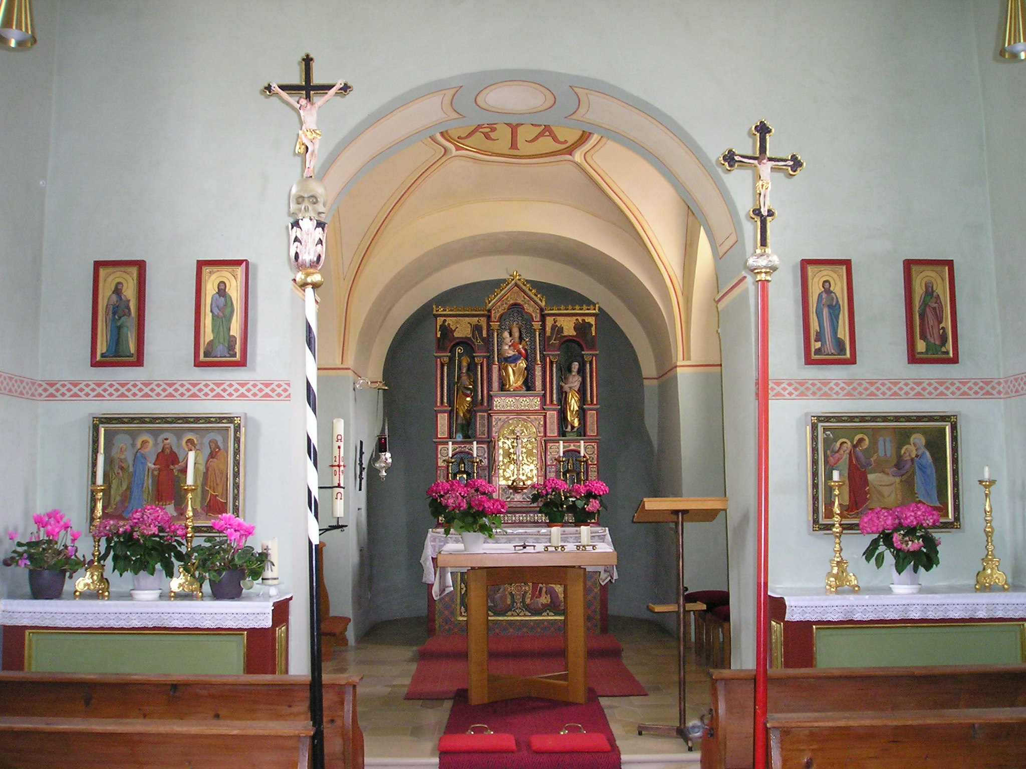 Ilbling_im_Landkreis_Eichstätt,_Kirche_innen.jpg